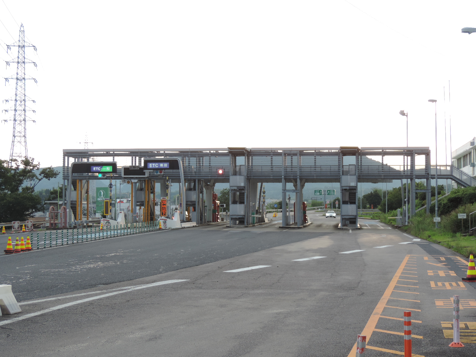 多治見IC料金所